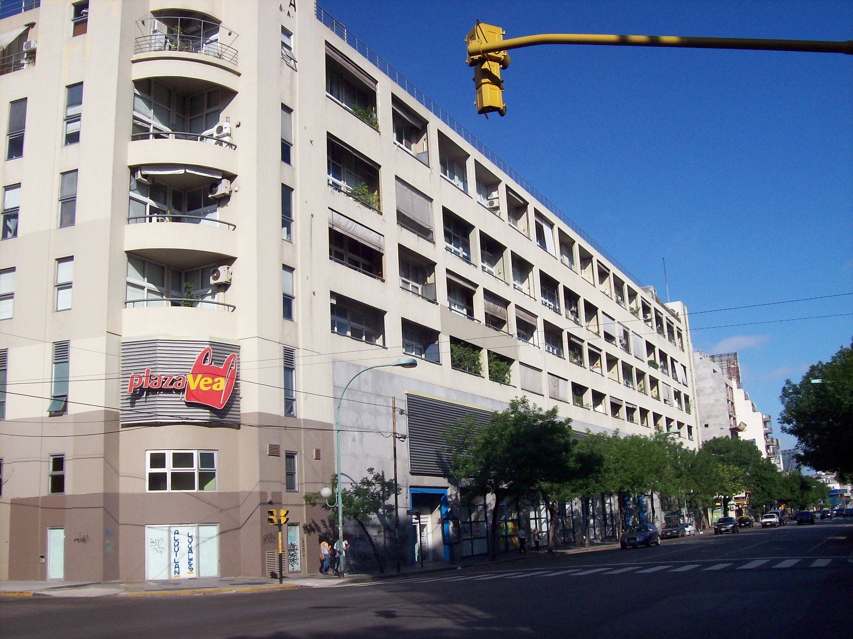 Edificio reciclado de la Algodonera, obra de Jorge Bunge (c.1945) reciclada por Dujovne-Hirsch (1998-2000). Avenida Córdoba y Jorge Newbery, Chacarita, Buenos Aires, Argentina.